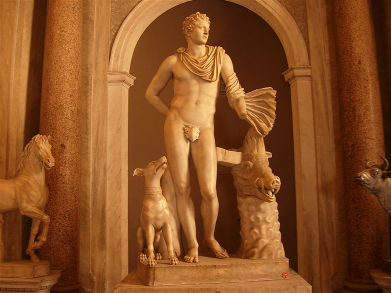 Vatican Pius Clementine Museum